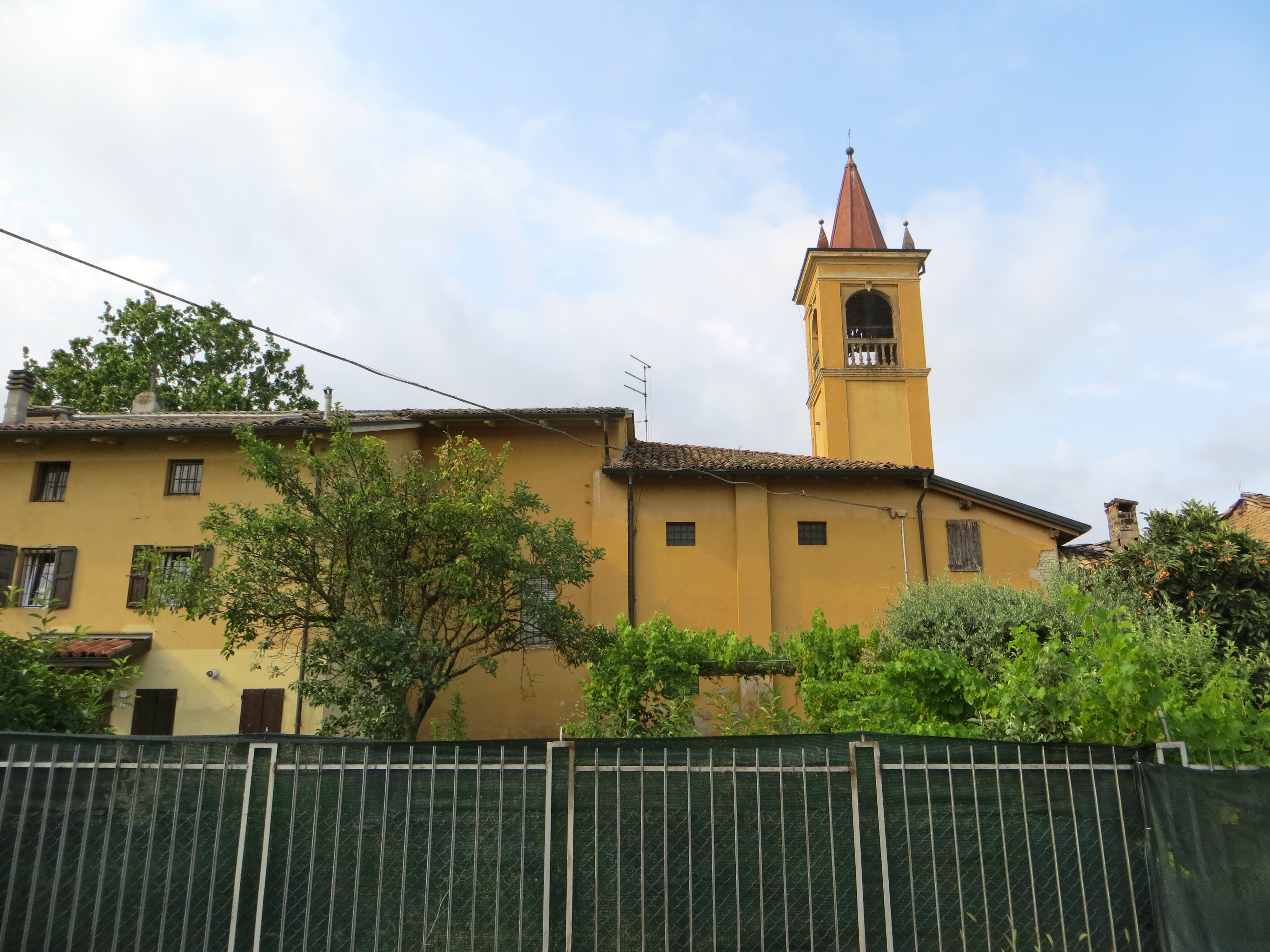 Chiesa di San Biagio (Vicopò, Parma) - lato sud